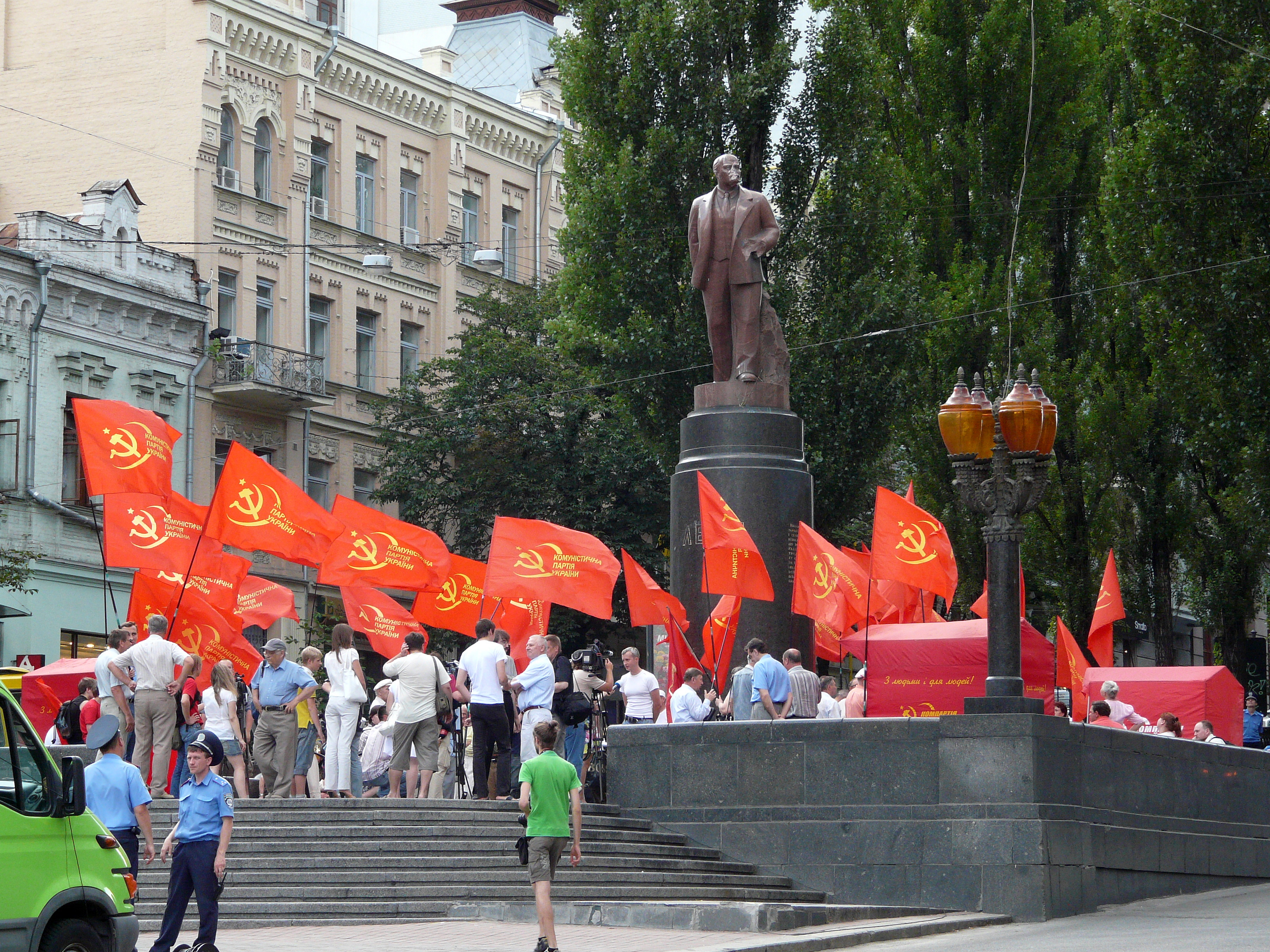 Пам'ятник Леніну В. І. (знесений), Київ, Шевченка Тараса бульв.